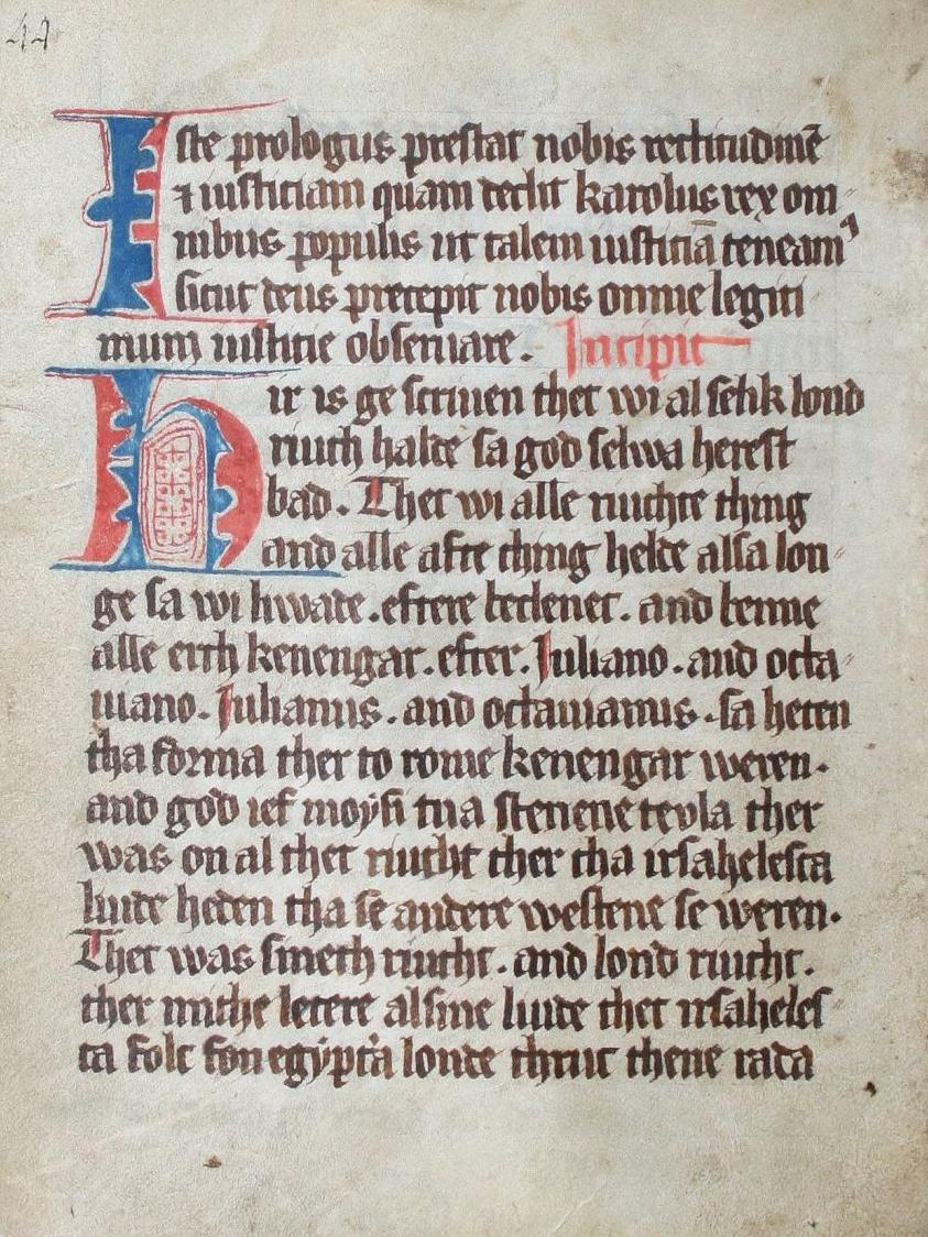 Bladzijde 44 van het Eerste Hunsingoër Handschrift (Ms. Wicht)